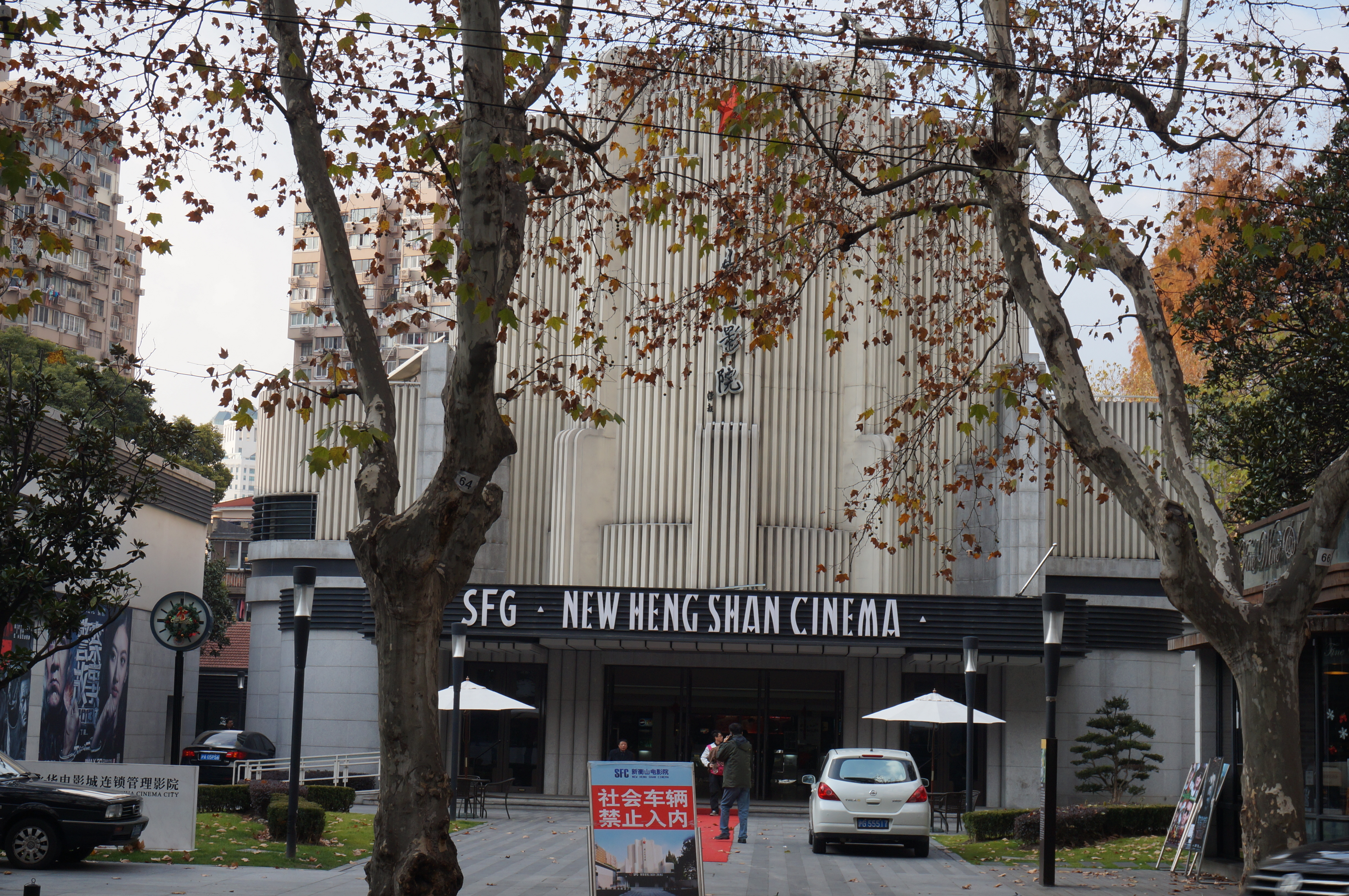 新衡山电影院